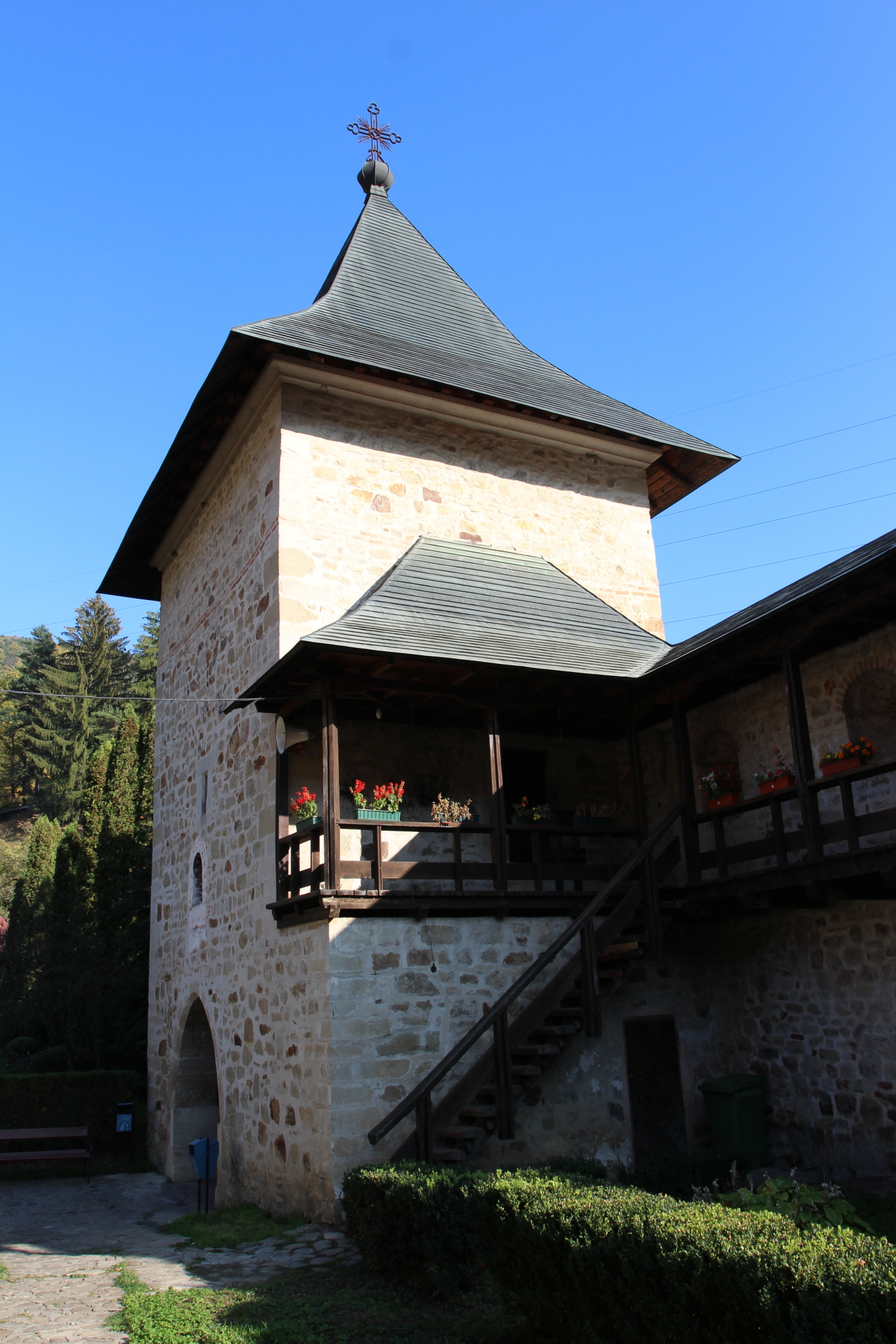 Turn intrare cu Paraclisul "Sf. Nicolae" 03